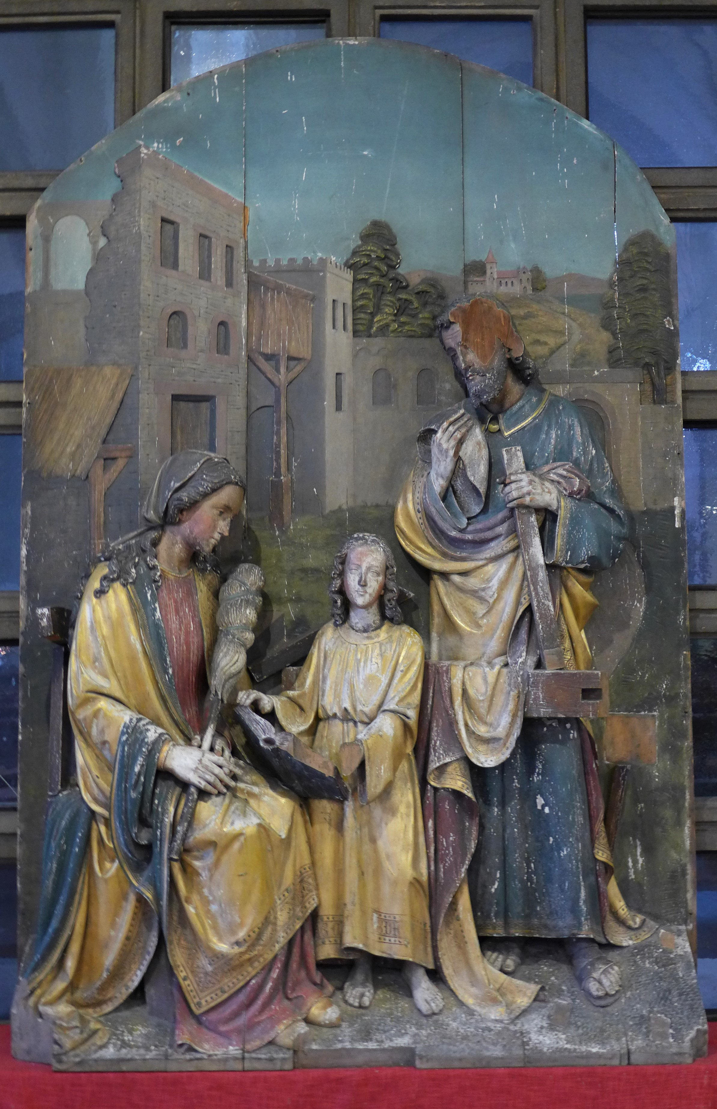 St. Josef (Saarbrücken), Josefsaltar, Zentralrelief "Heilige Familie"